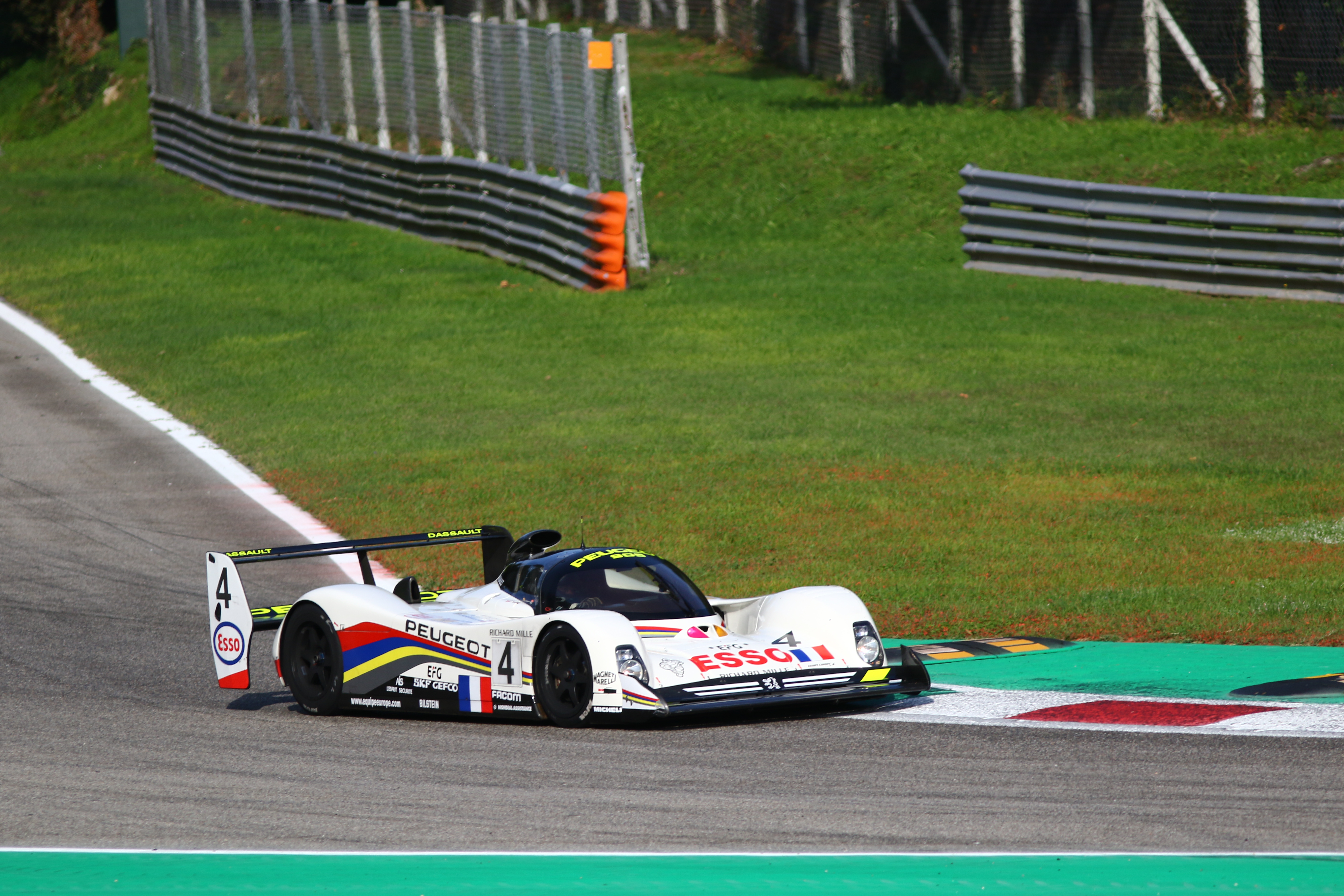 Peugeot 905 Evo 1 bis en configuration sprint